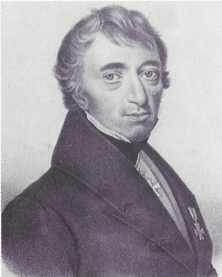 Porträtlithographie von Christoph Heinrich Pfaff (1773-1852)